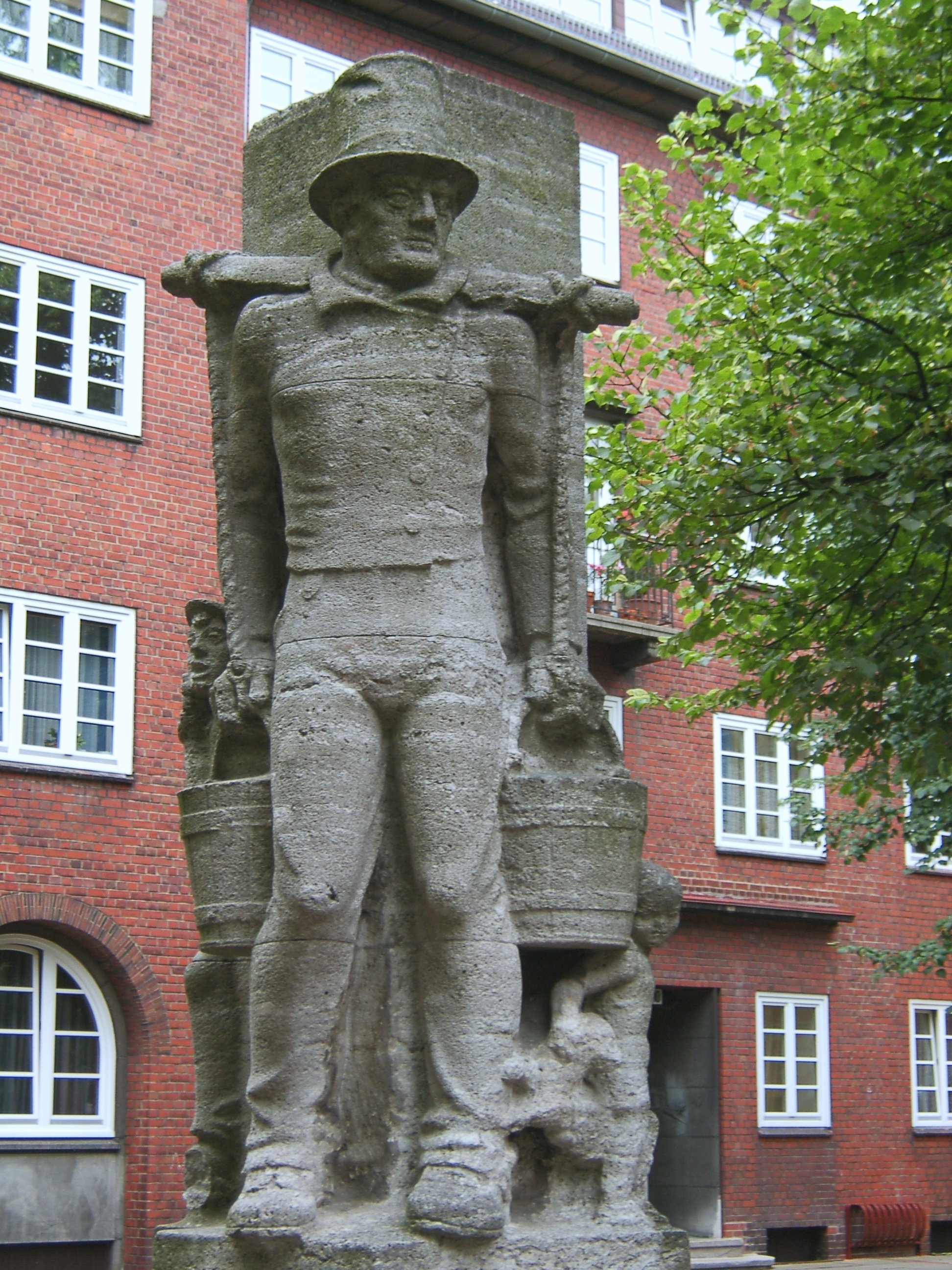 Der Hummelbrunnen im Rademachergang in der Hamburger Neustadt wurde vom Verein geborener Hamburger und dem Bauverein zu Hamburg gestiftet und von Richard Kuöhl 1937 geschaffen.